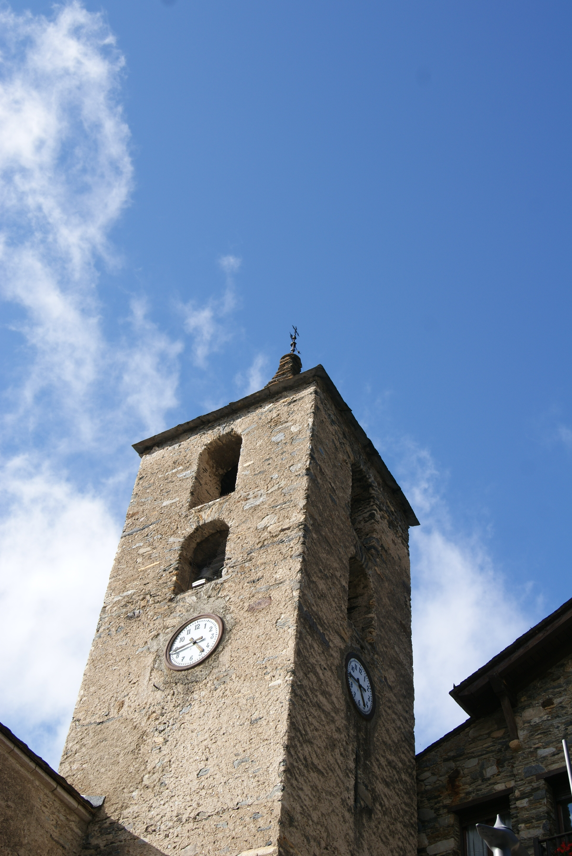 Església de Sant Corneli i Sant Cebrià (Ordino)